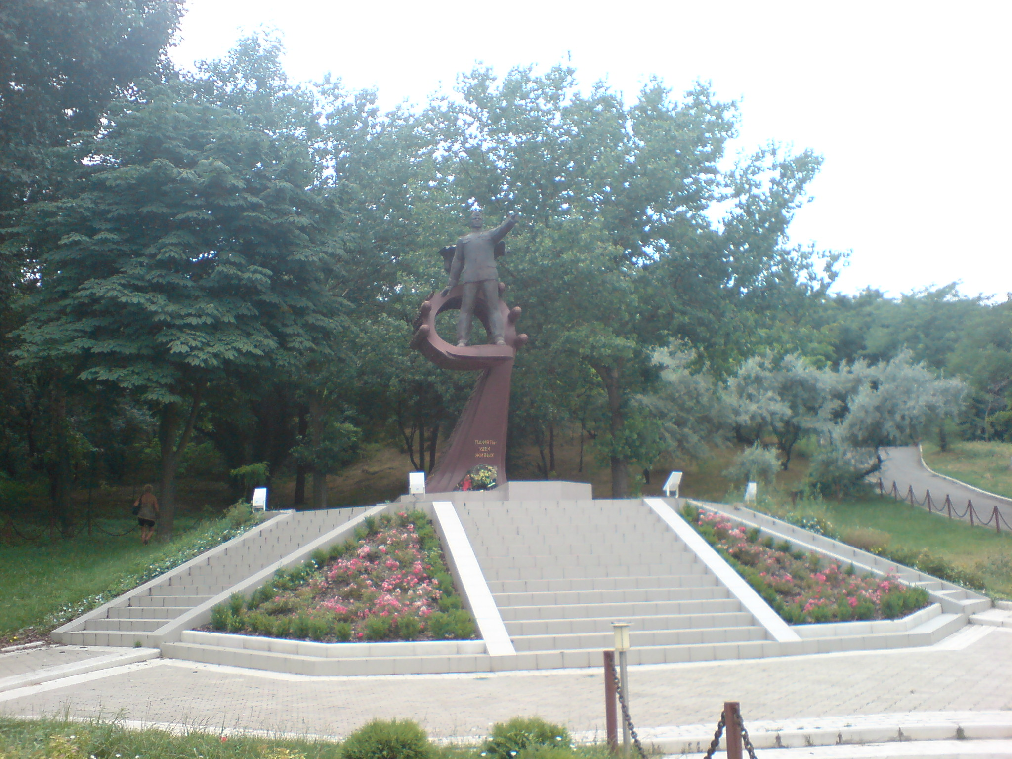 Пам'ятник Олександру Маринеско на однойменному узвозі в Одесі. Скульптор: Копйов А.В., архітектор: Мироненко В.І., художник: Кучеров В.І.